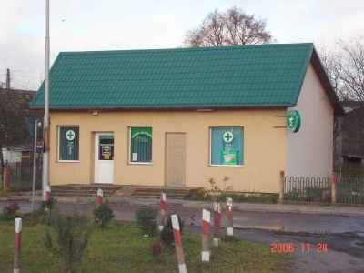 Apteka w Redle